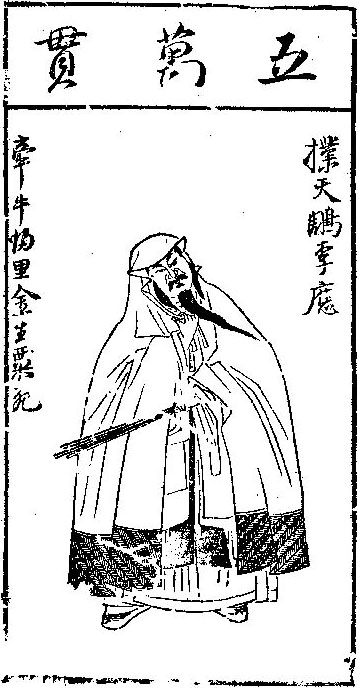 版画《水浒叶子》，水浒人物“李应”